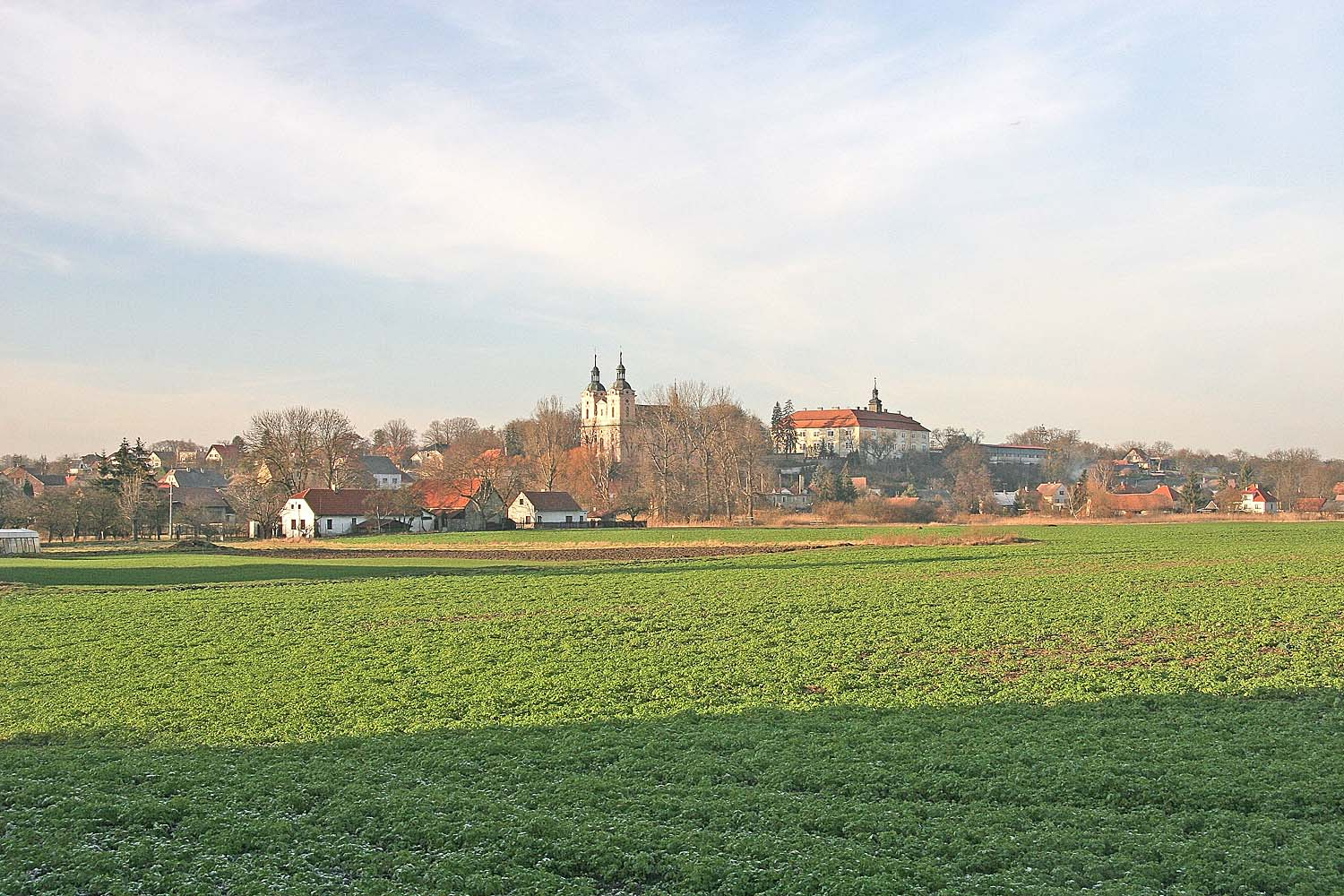 Pohled na městečko Rožďalovice, okres Nymburk